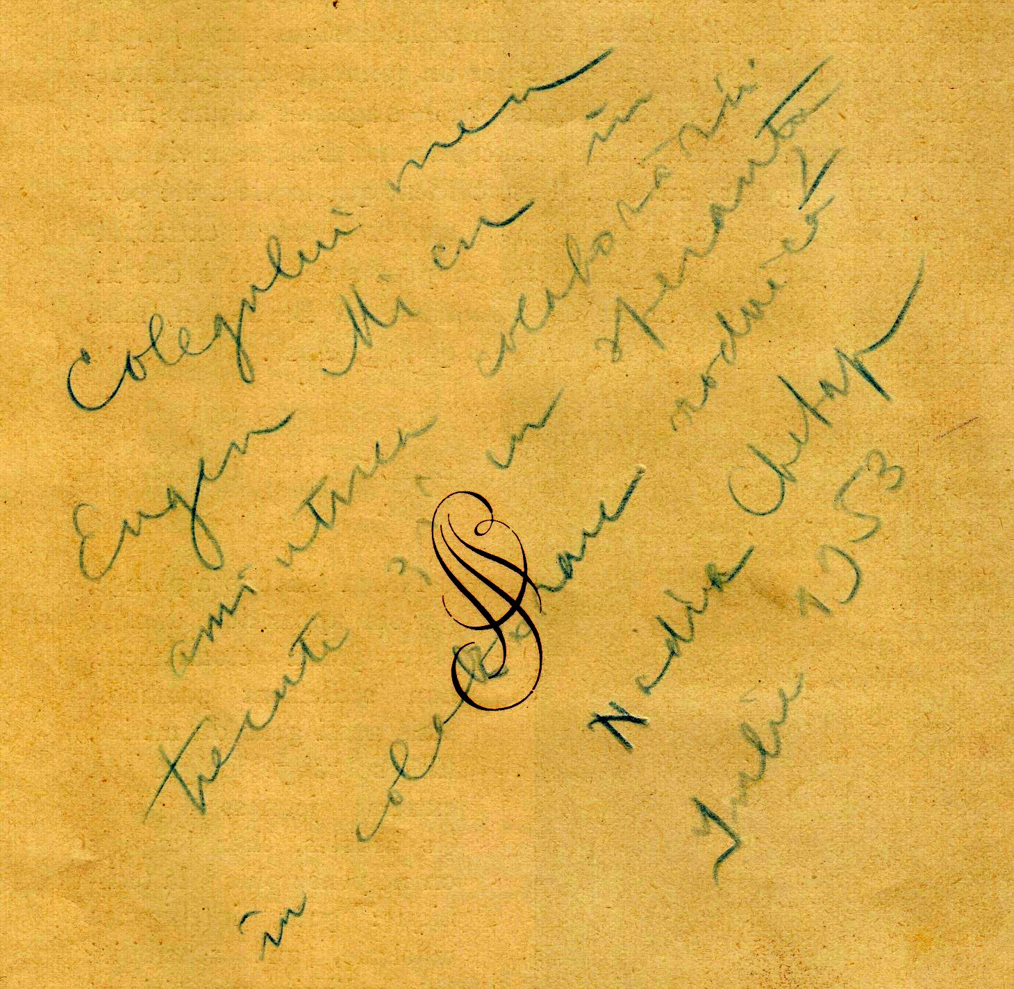 Nadia Chebap dedicatie